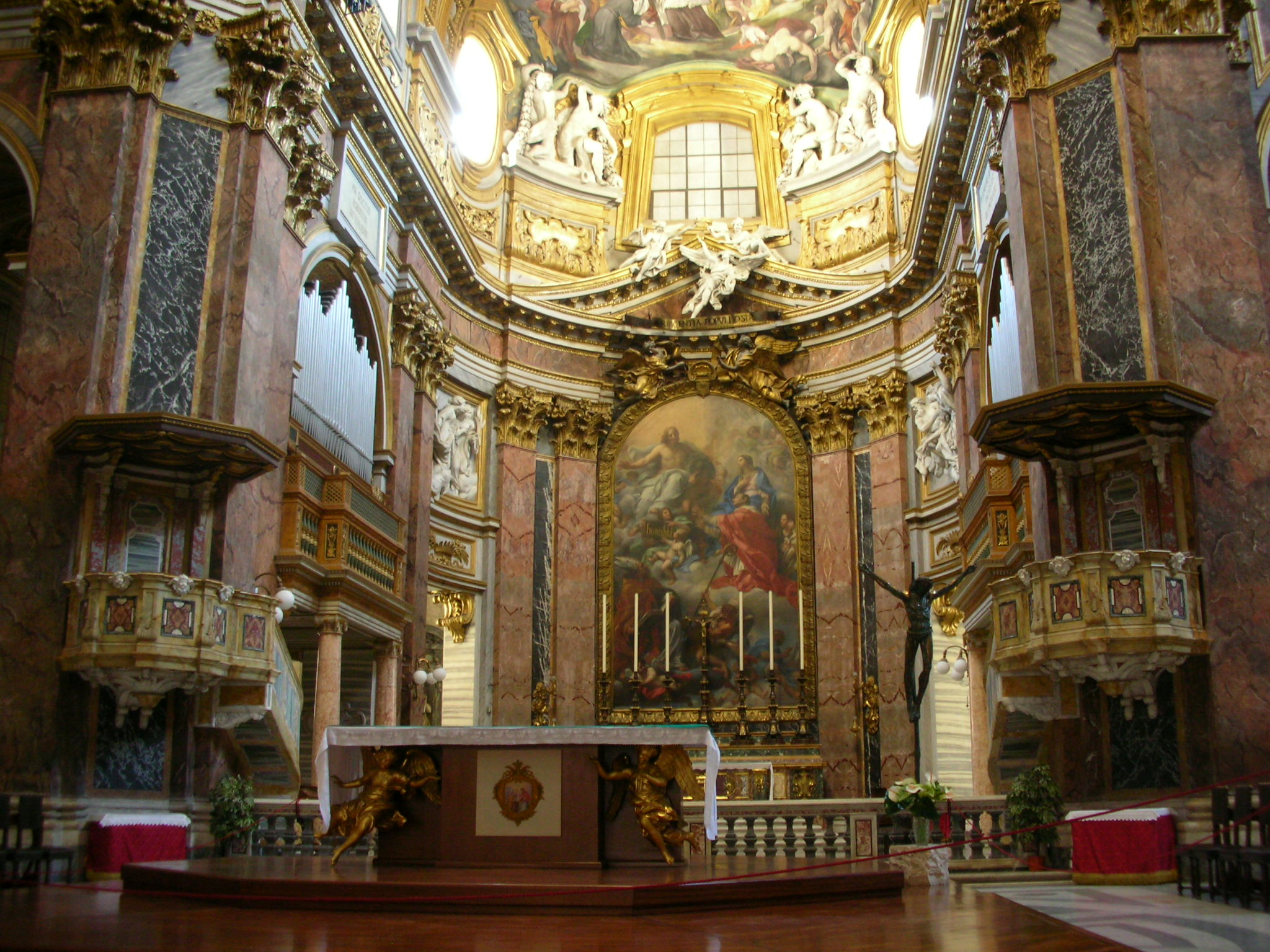 Main Altar, San Carlo al Corso, Rome.